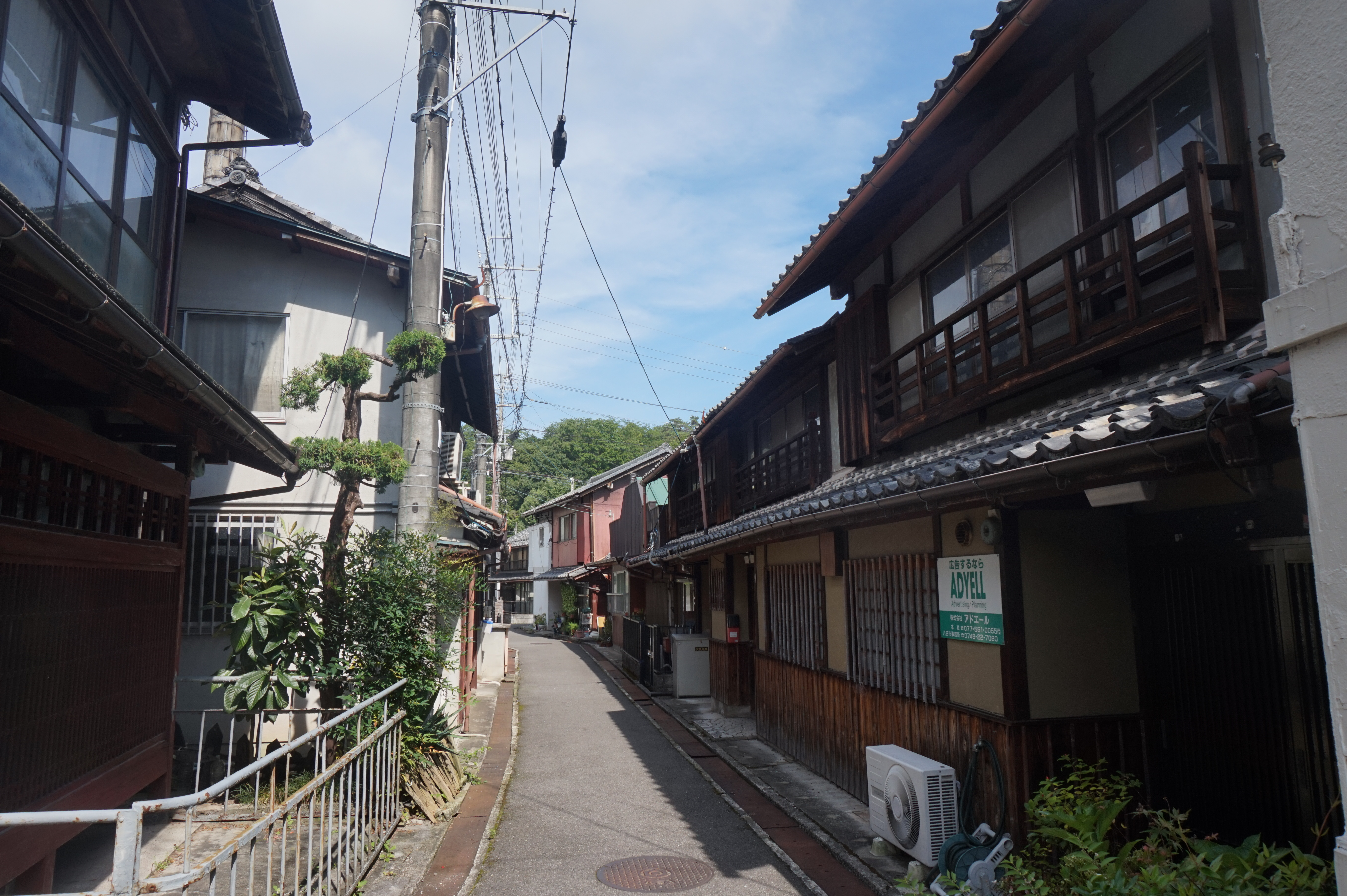 滋賀県東近江市の旧延命新地。